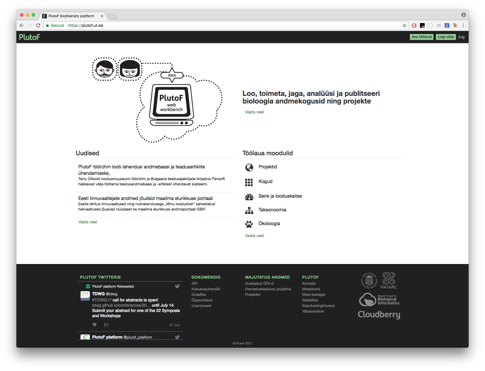 PlutoF esileht